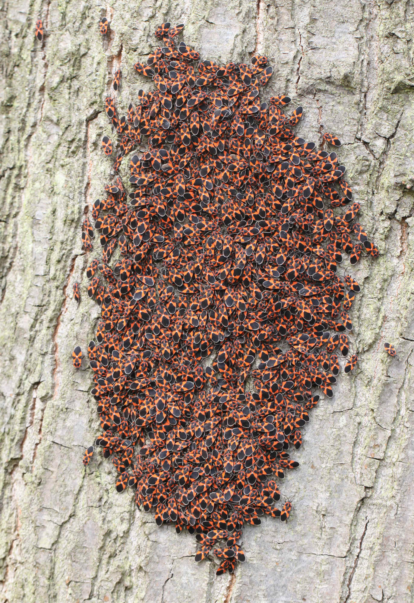 Aggregation der Schwalbenwurzwanze (Tropidothorax leucopterus) an einem Baumstamm am 1.4.2017 in der Schwetzinger Hardt